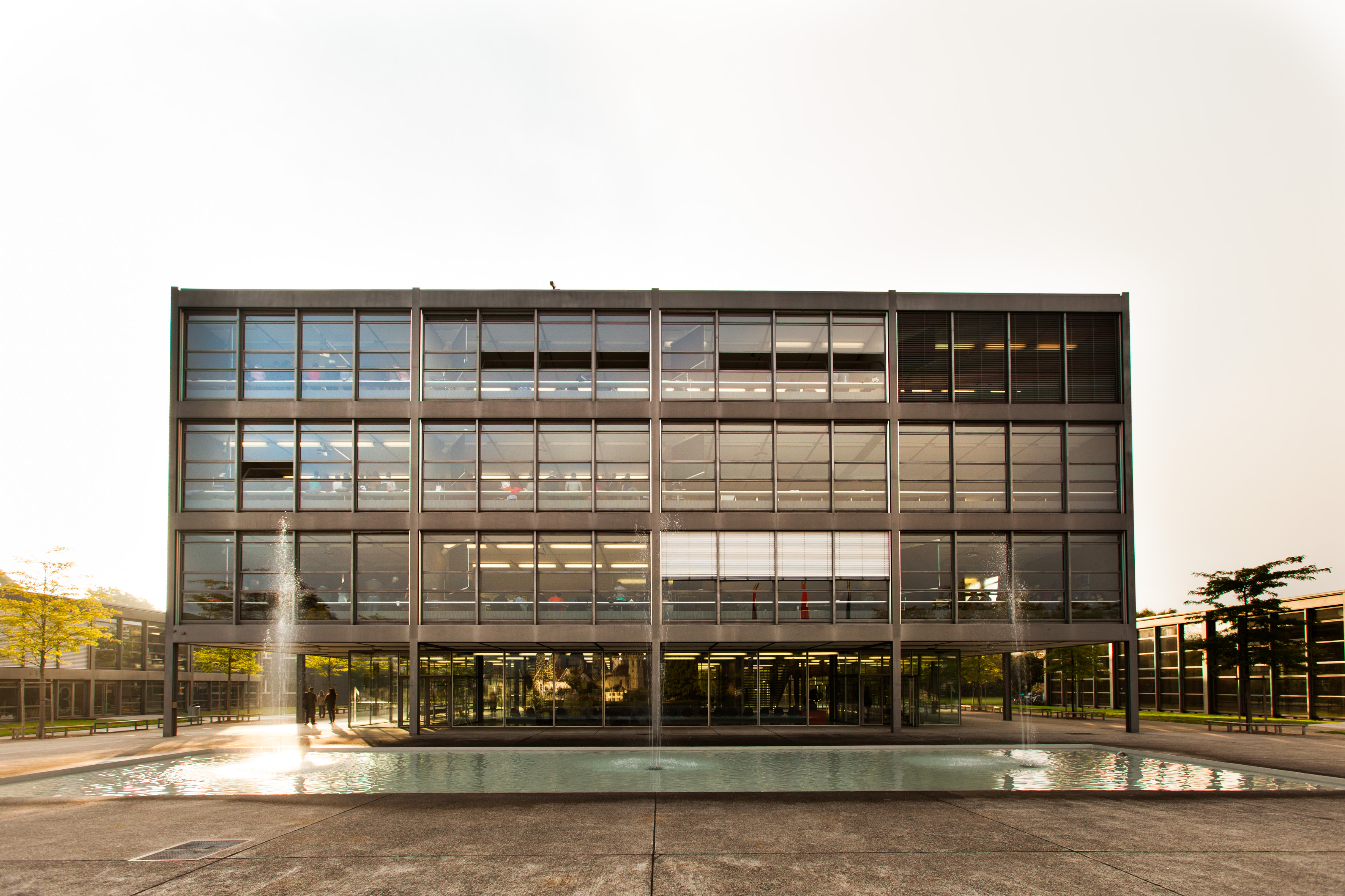 Campus der Kantonsschule Baden am Besuchstag 2015.